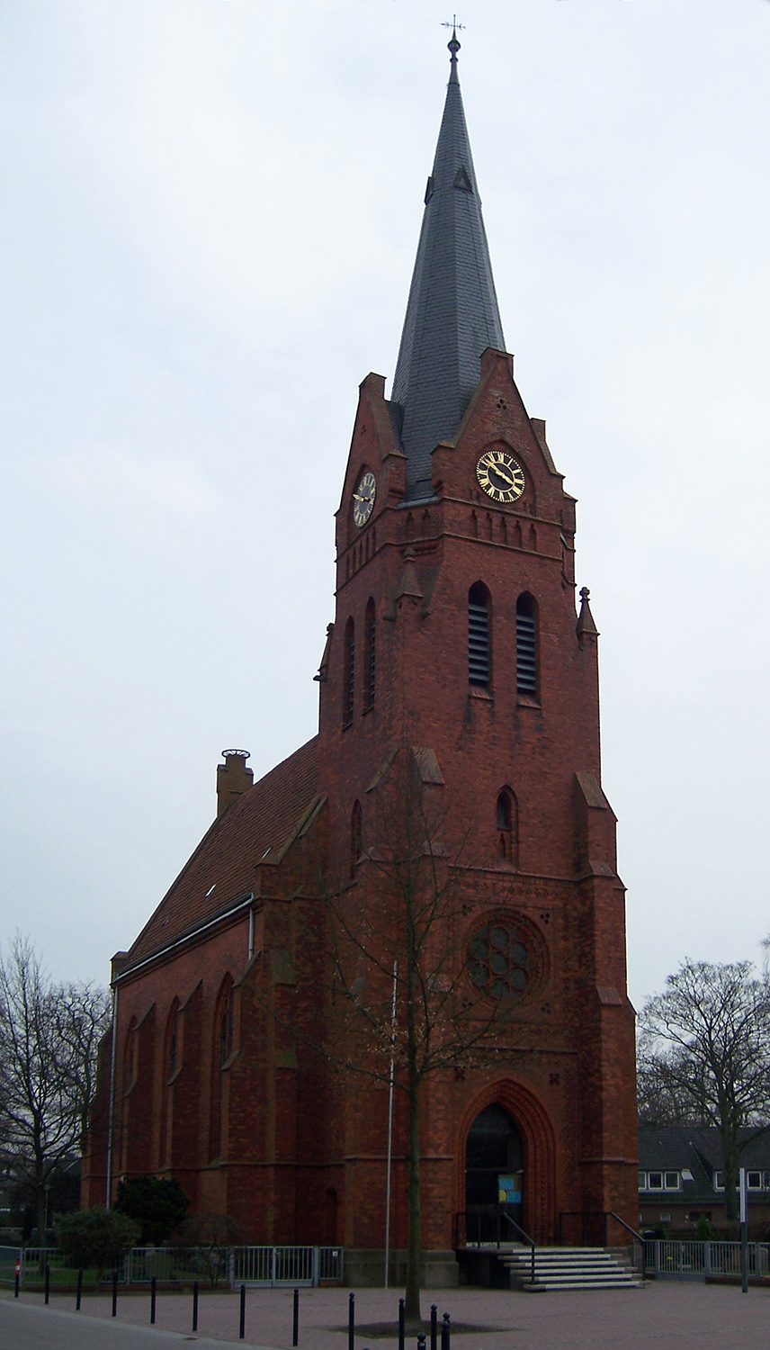 St. Georgs-Kirche in Bremen- Huchting.